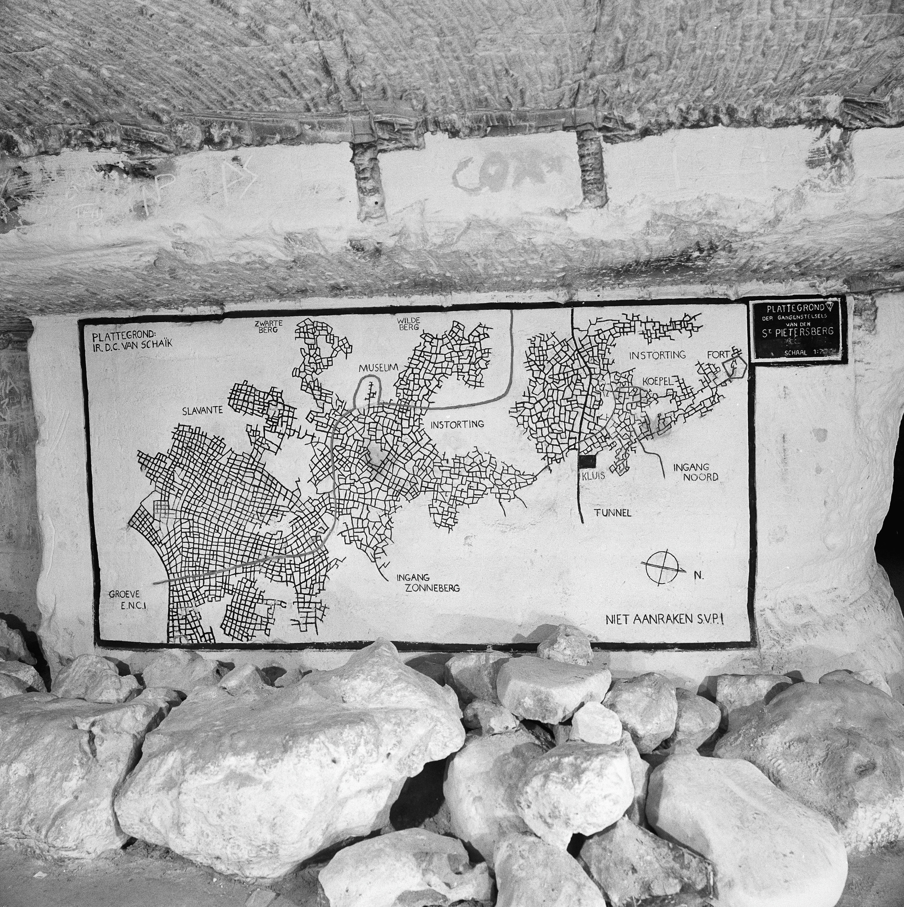 Sint-Pietersberg, ondergronds gangenstelsel in mergelgrot: houtskooltekening met plattegrond van gangenstelsel, getekend door Pierre Nieste naar kartering door Ir. D.C. van Schaik (voltooid 1959).